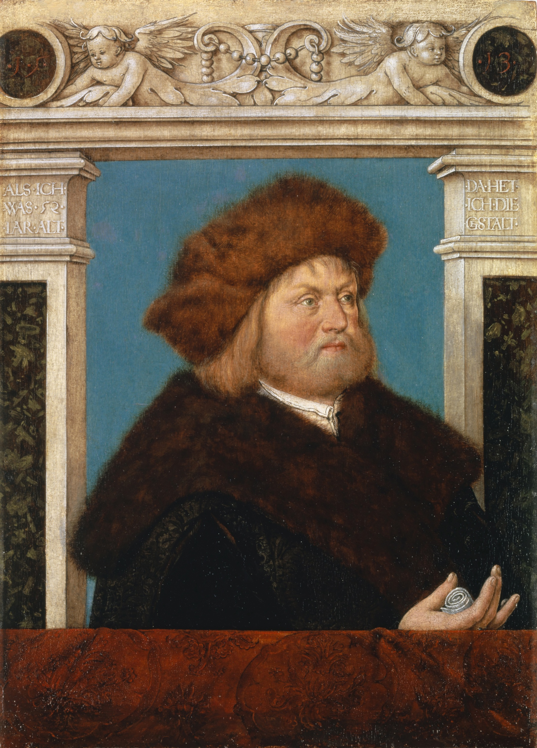 Hans Holbein d.Ä.: Bildnis des Philipp Adler, 1513. HxB: 41.3 x 29.5 cm; Öl auf Linden(?)holz. Kunstmuseum Basel, Inv. G 1981.1